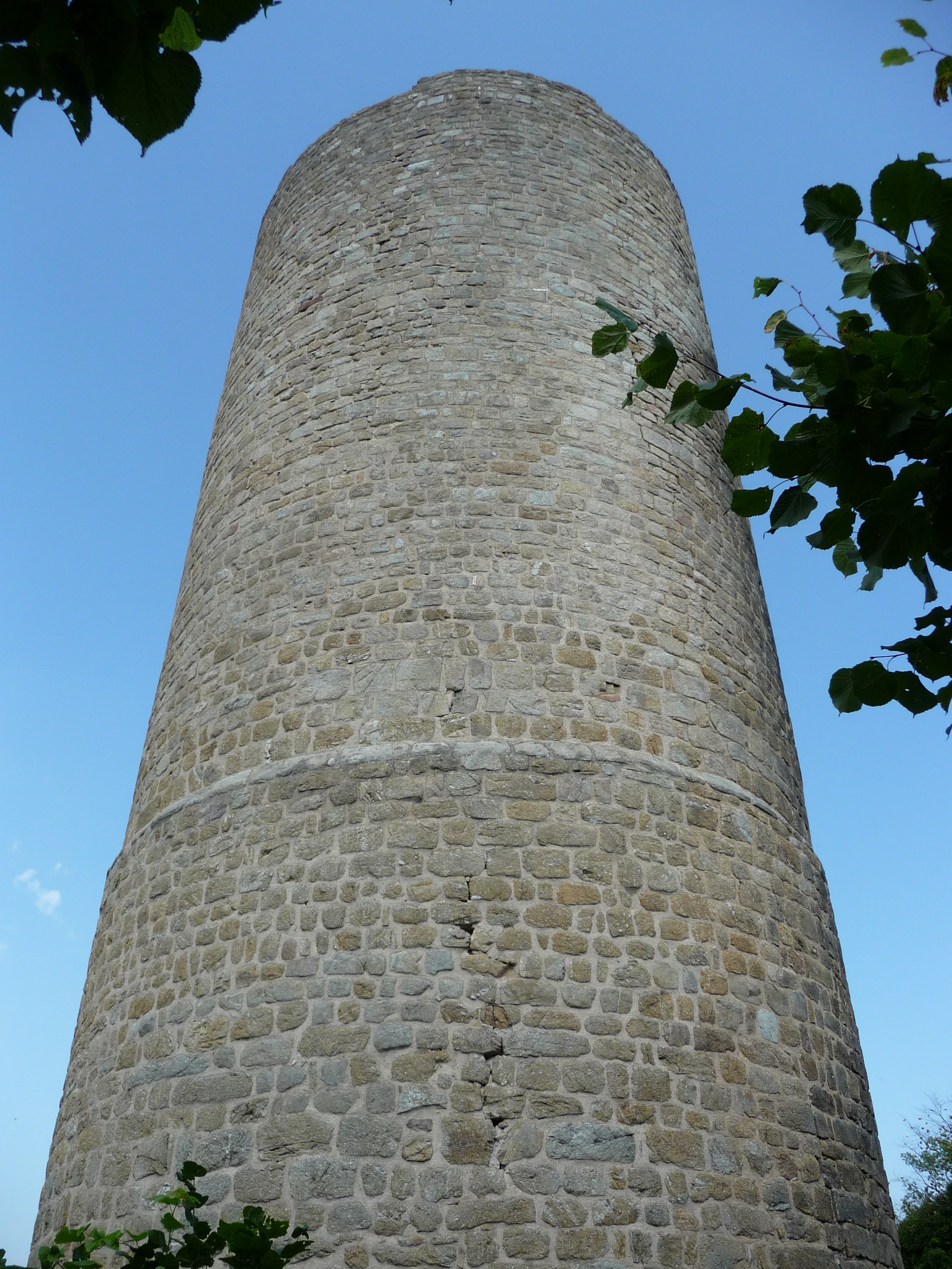 Le donjon du Château du Pflixbourg, Wintzenheim, Haut-Rhin.